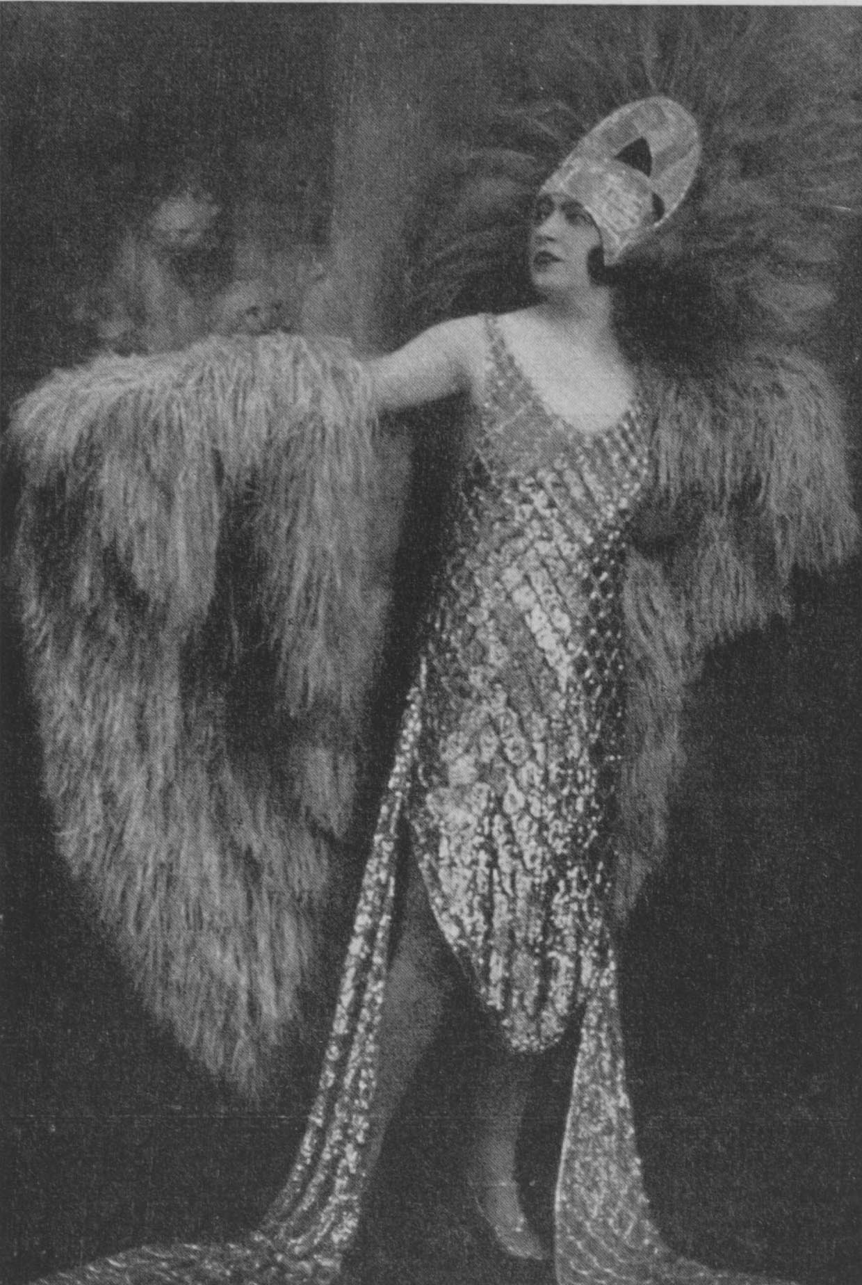 La cantante di Operetta e Soubrette Ines Lidelba in costume nell'operetta Zarewich di Franz Lehar, maggio 1927